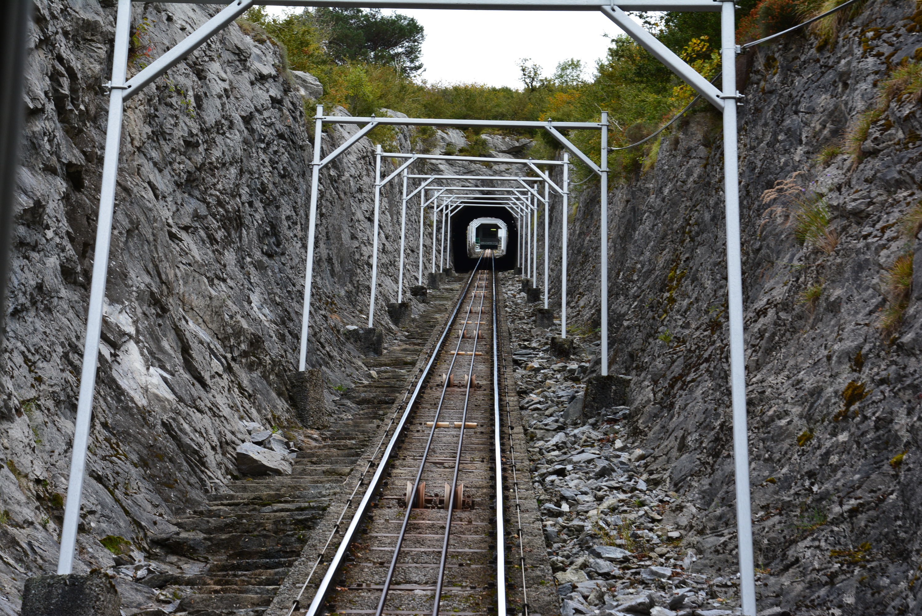 Funicolare del Pic du Jer a Lourdes